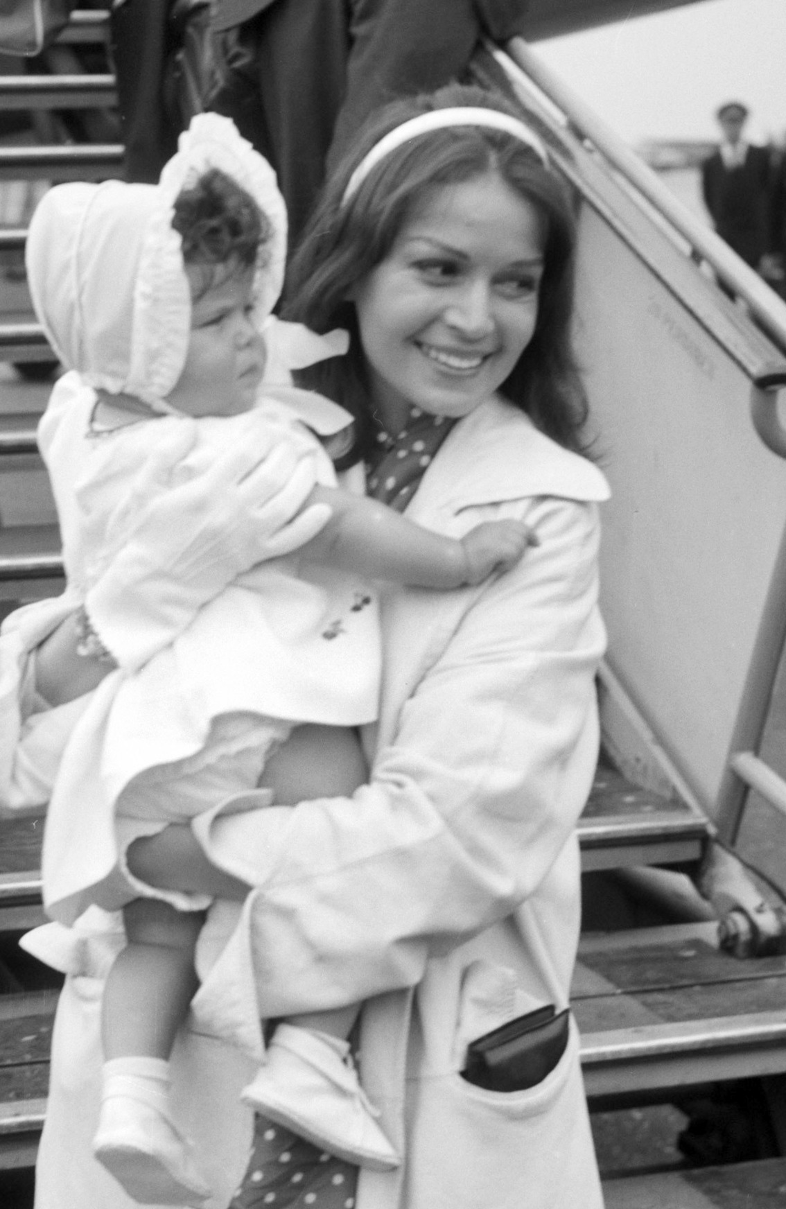 Aankomst van actrice Eva Barlok op Schiphol